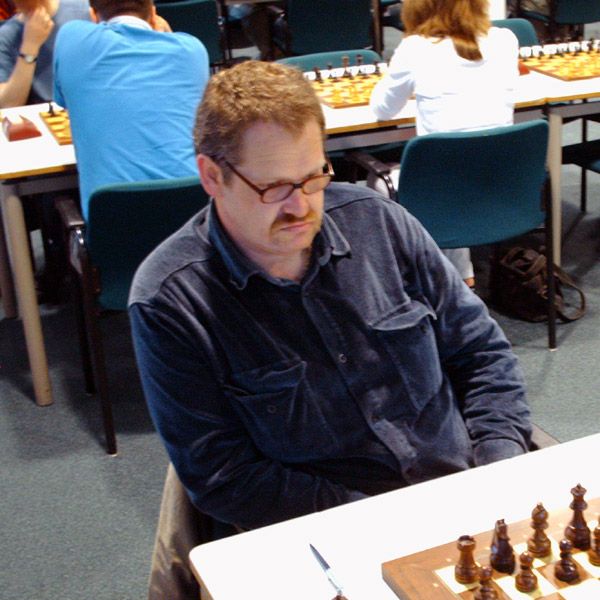 GM Vladimir Epishin, Utrecht 2007